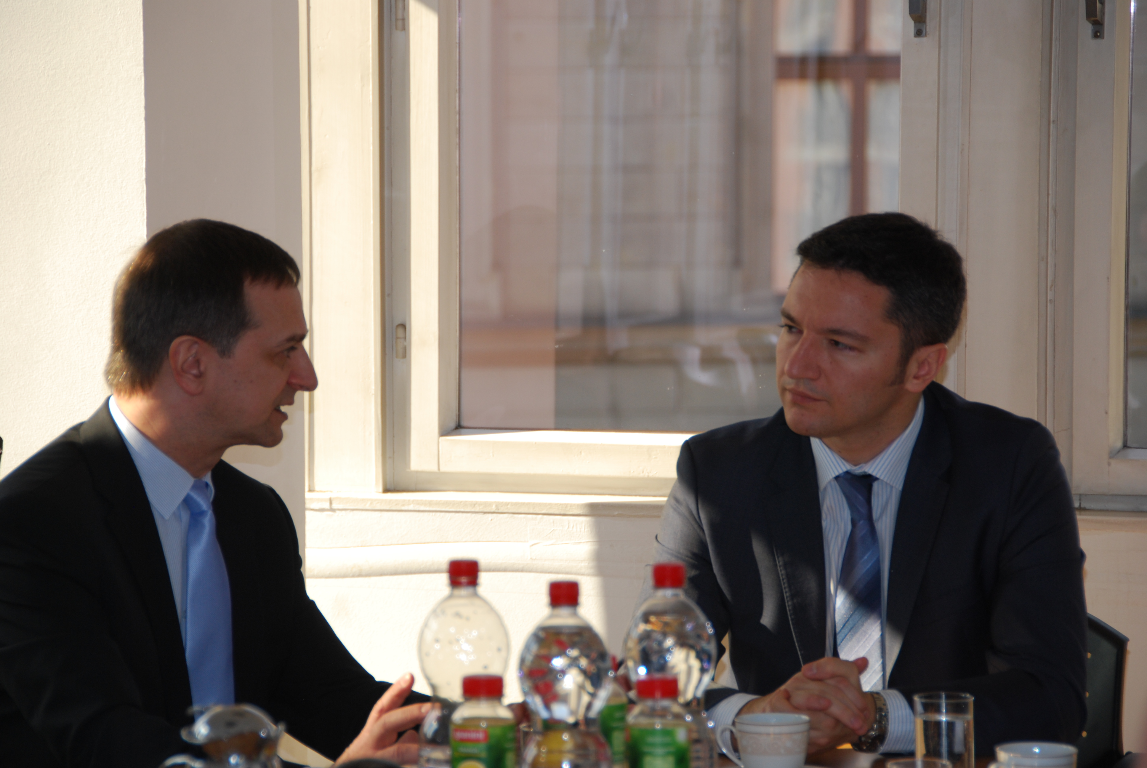 Кристиан Вигенин и посланик Ради Найденов